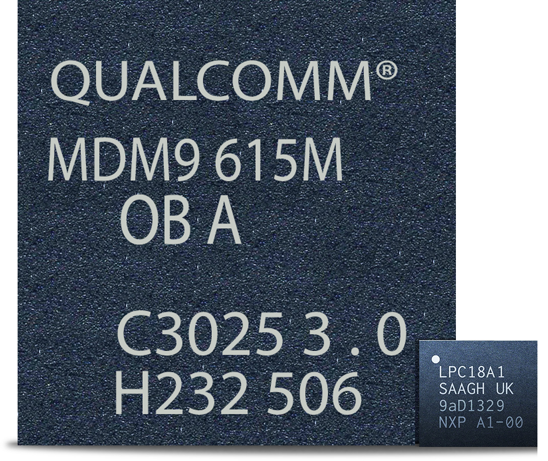 Größenvergleich zwischen einem Qualcomm iPhone Baseband-Prozessor und dem M7-Koprozessor